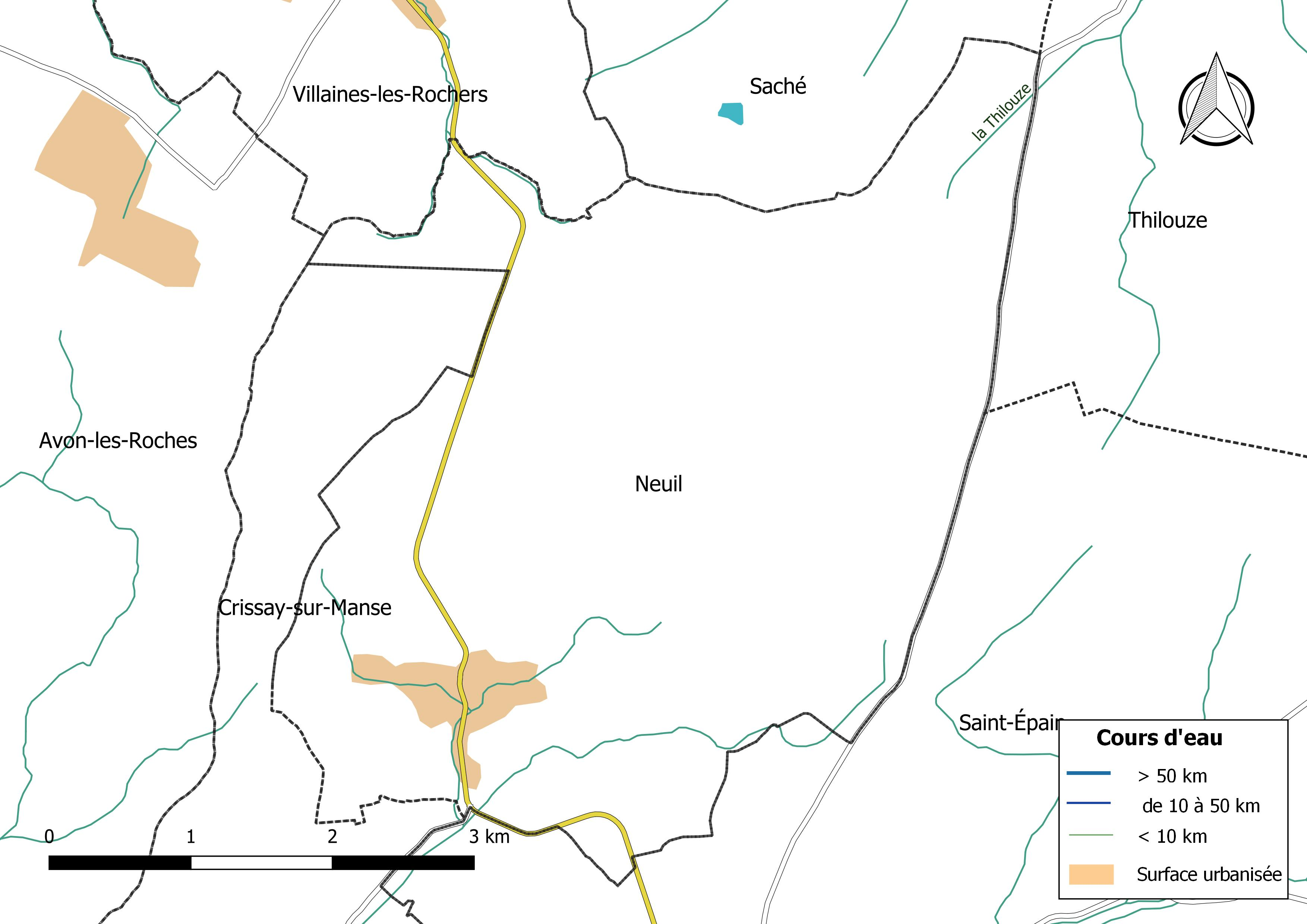 Carte du réseau hydrographique de la commune de Neuil (France).